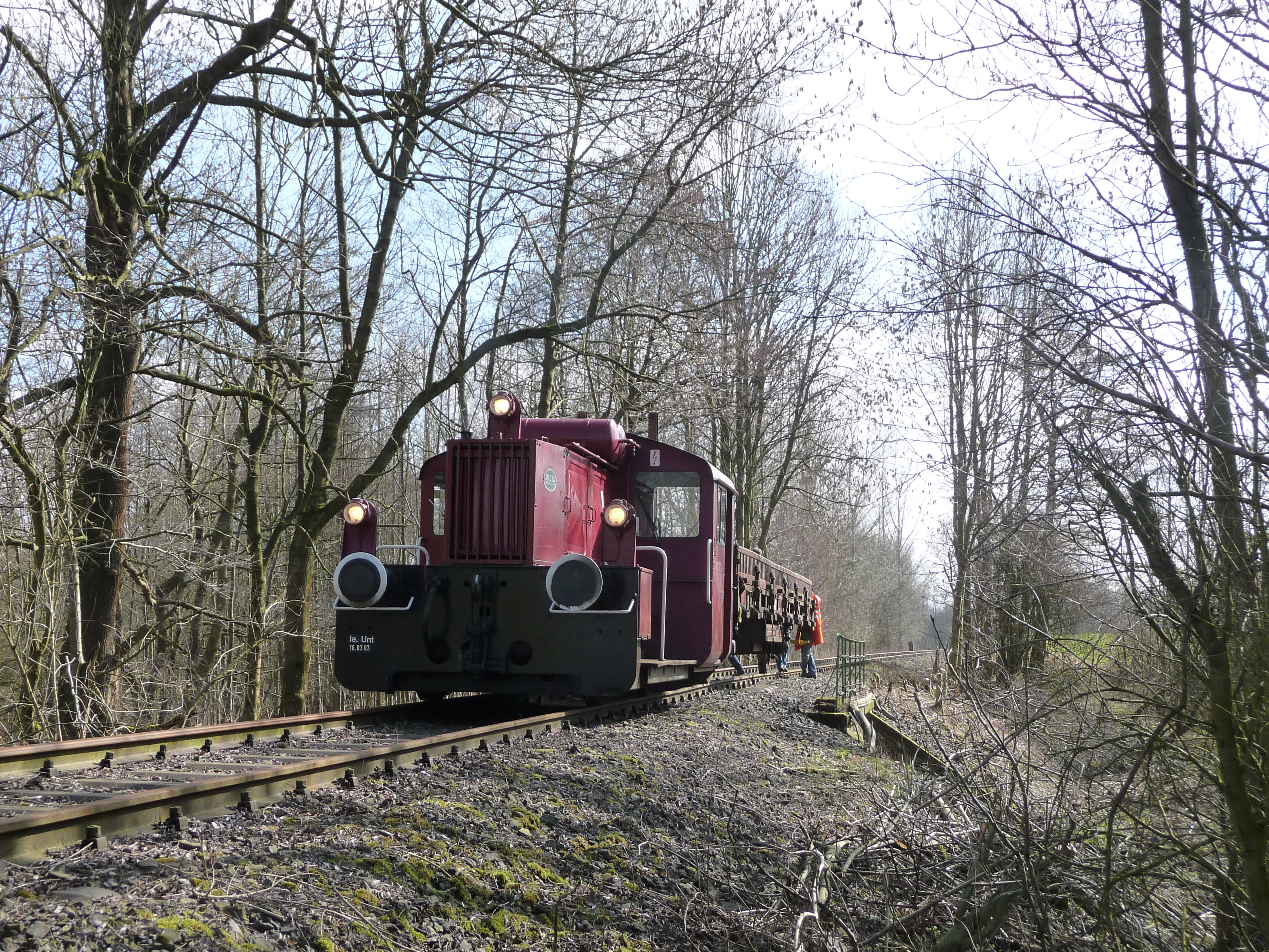 Köf 6815 der Landeseisenbahnlippe im Bauzugdienst zwischen Barntrup und Bega